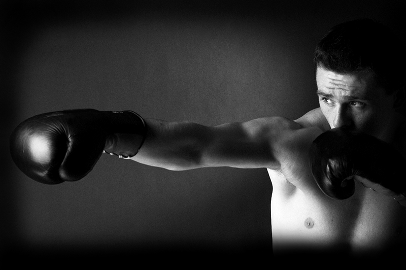 Vitali Tajbert (* 1982), deutscher Boxer im Super-Federgewicht.